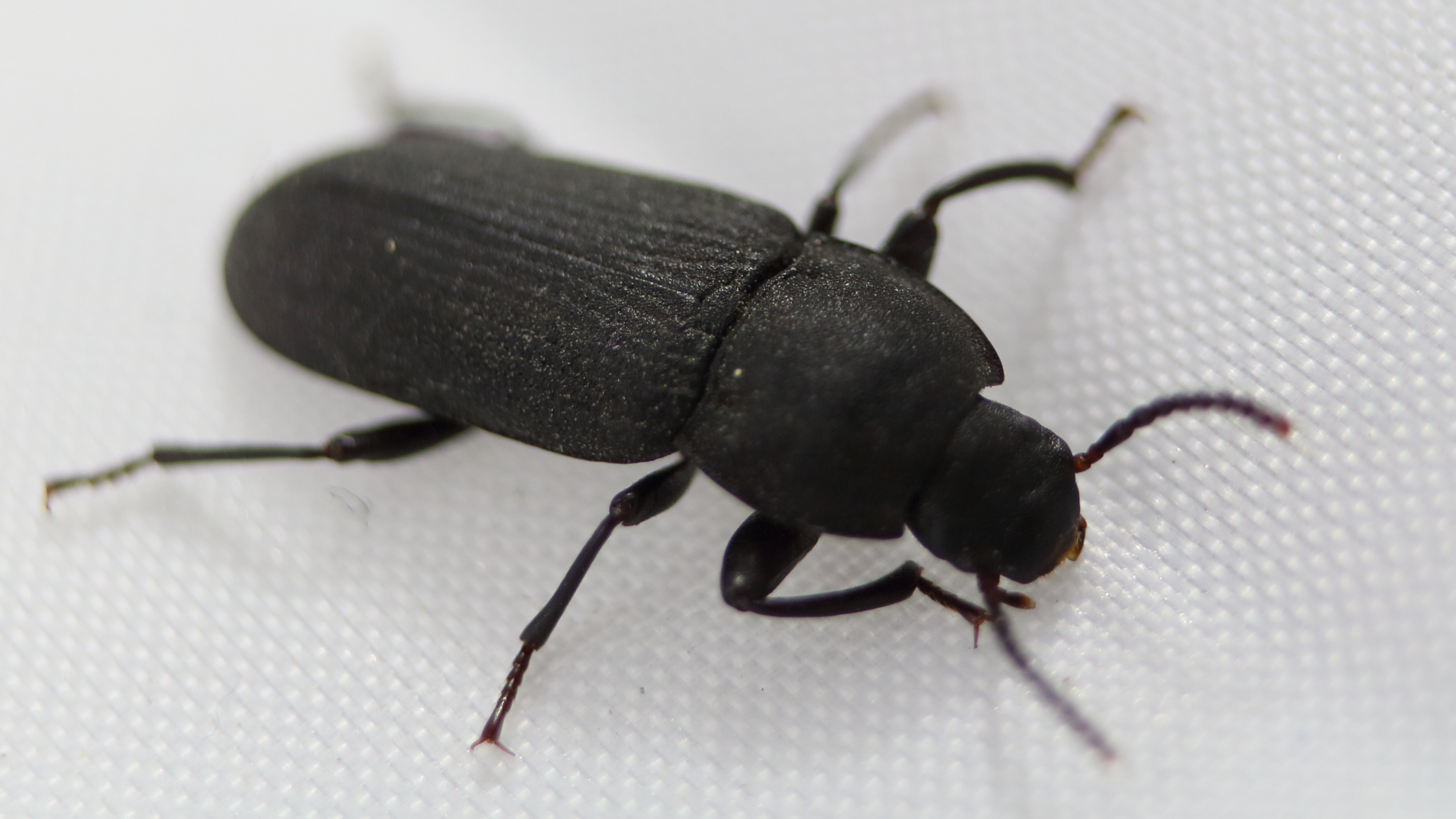 Dunkler Mehlkäfer Tenebrio obscurus, Körperlänge ca. 15 mm Der abgebildete Käfer wurde am 6. September 2015 von Christoph auf kerbtier.de bestimmt und von Klaas bestätigt, auf Grund meiner (Norbert) Anfrage dort vom 6. September 2015 The bug shown here has been identified from Christoph and confirmed by Klaas on kerbtier.de 2015, September 6th, my (Norbert) question there dated 2015, September 6th